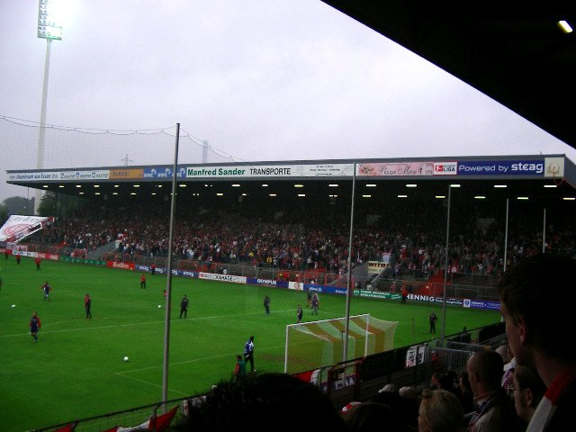 Nordtribüne des Georg-Melches-Stadions in Essen